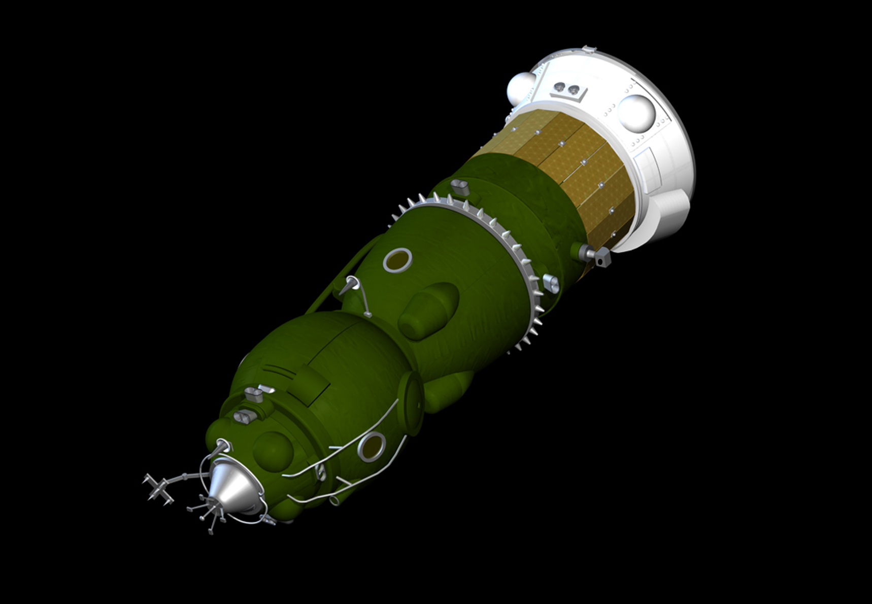 N-1 Herkules, Entwicklung einer Trägerrakete; Dr. Olaf Przybilski, Stefan Wotzlaw Urheber Eberhard Marx 08.10.2008 Einstellung durch den Urheber, extra Genehmigung nicht notwendig